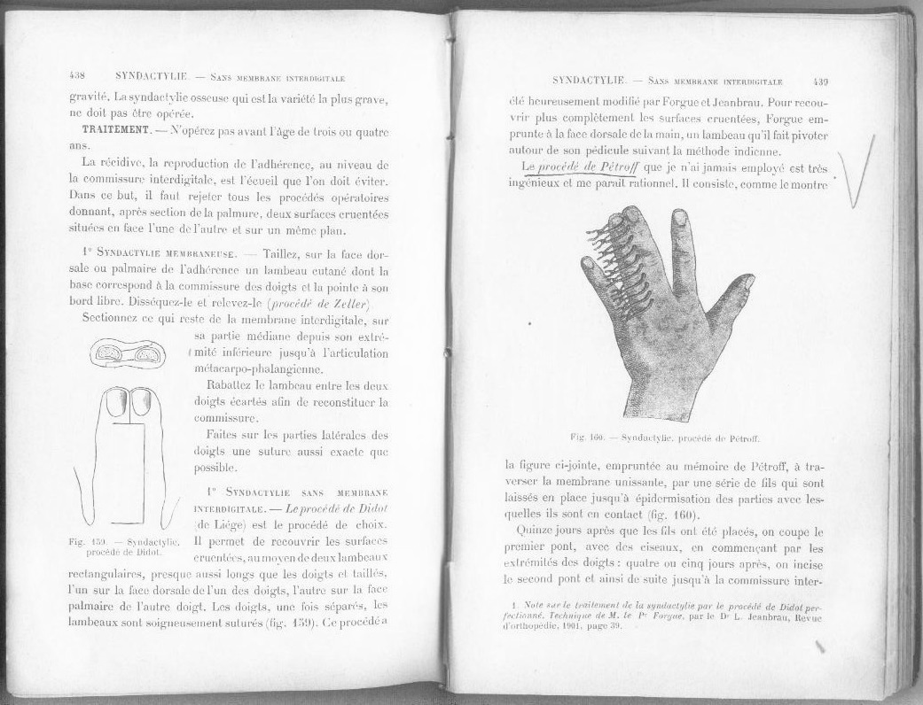 page 439 from the book by Eugene Estor Guide Pratique de Chirurgie Infantile. Paris, Alcan, 1904 Source: personal archive Marin Gentchev